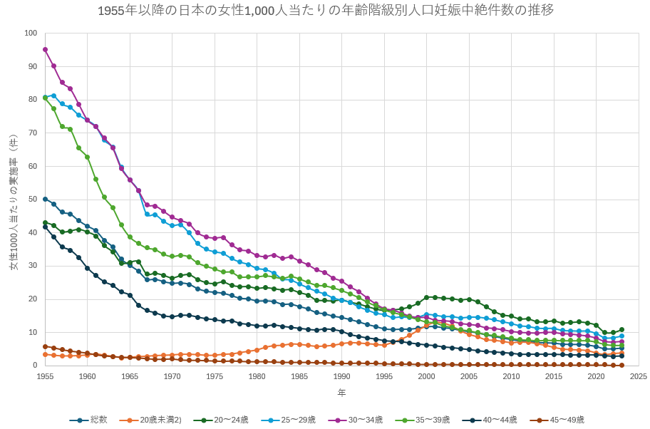 1955年以降の日本の女性1000人当たりの年齢階級別人口妊娠中絶件数の推移